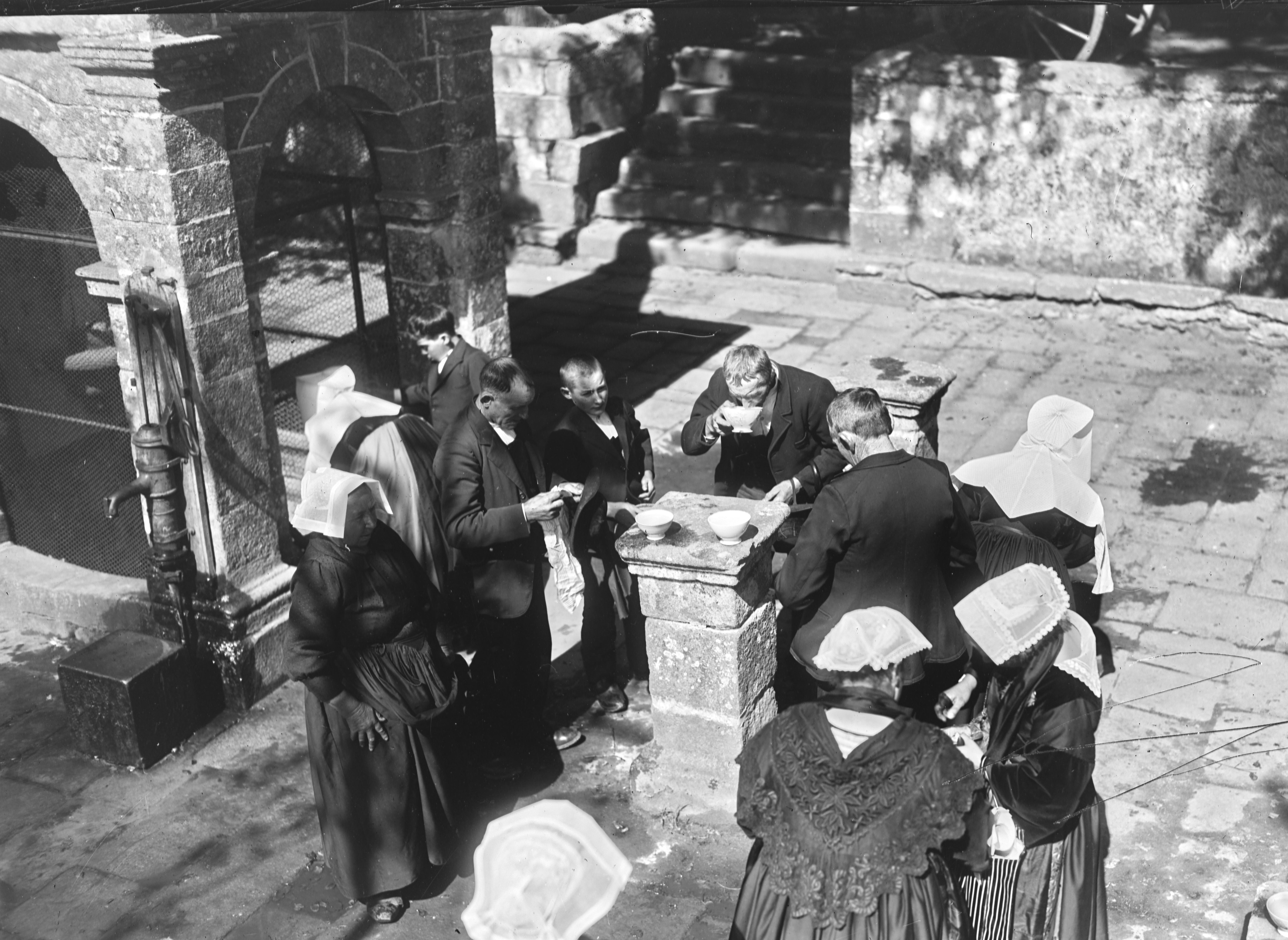 Carnac, fontaine Saint-Cornély : rite de la boisson de l'eau de la fontaine lors de la fête religieuse du Grand Pardon (14 septembre 1924)